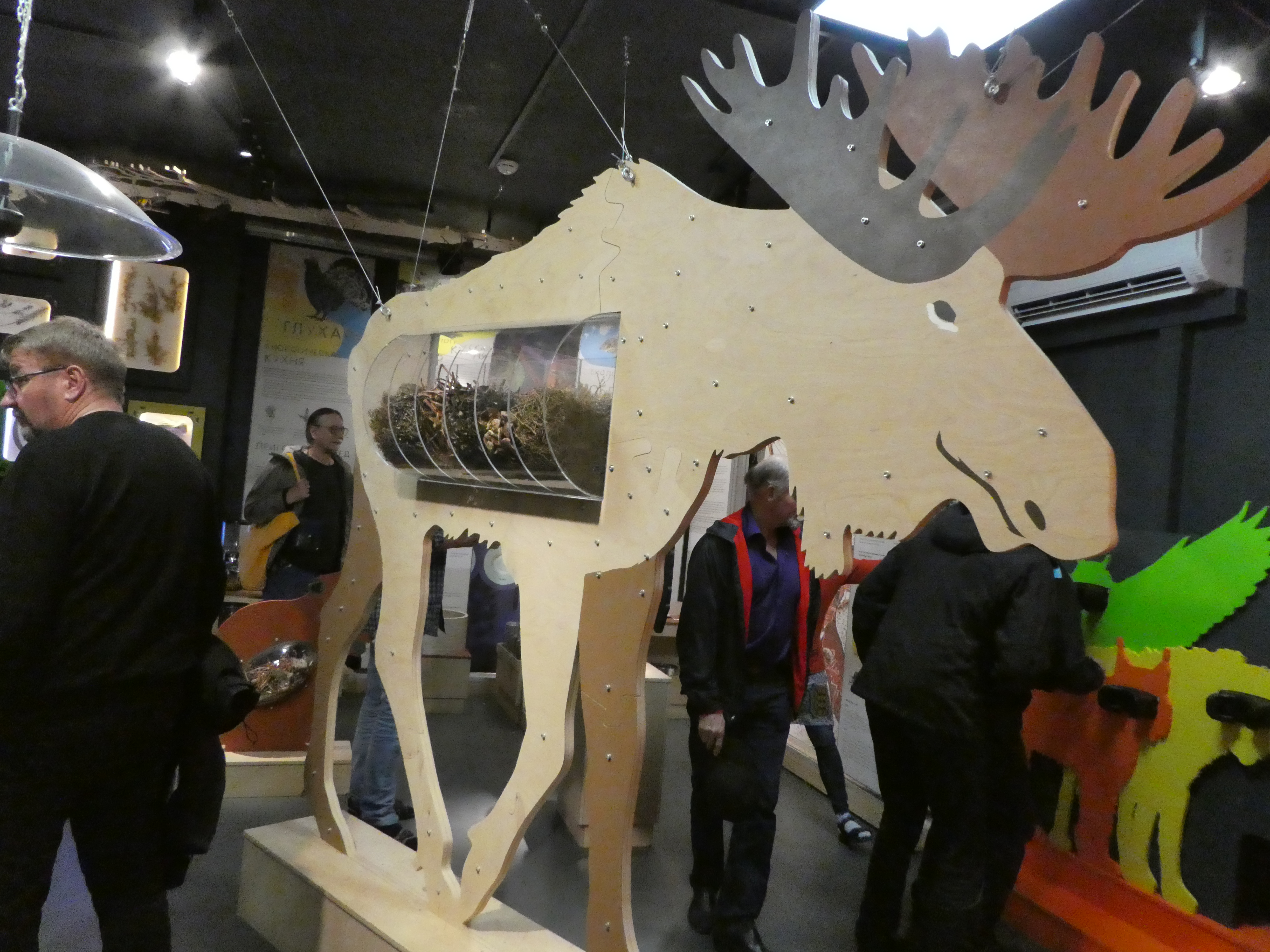 Esimerkki Kostamuksen luontokeskuksen näyttelyosastolta